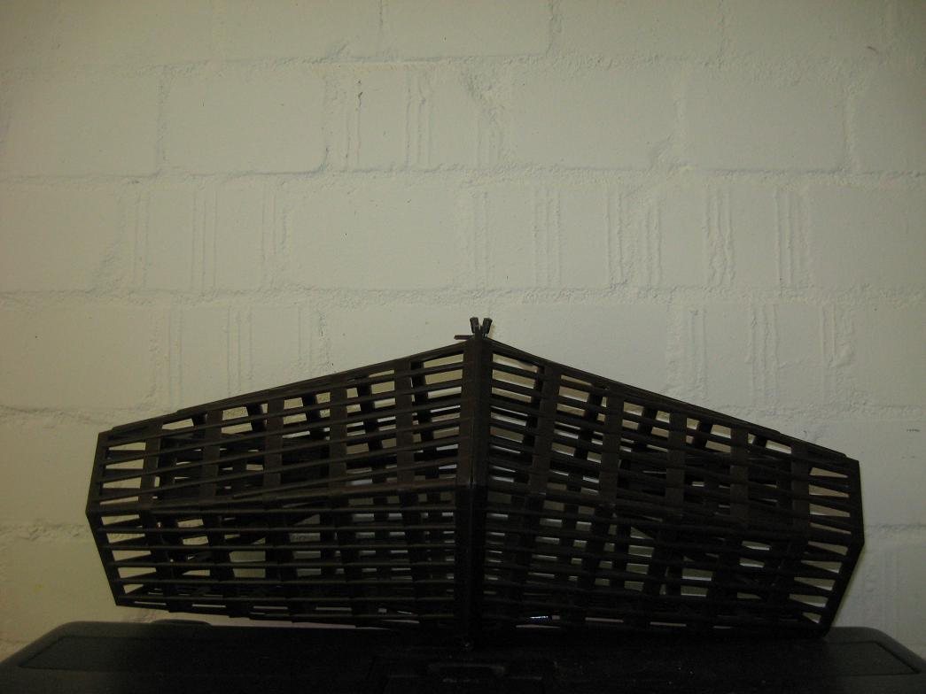 Krebskorb des Typs "Pirat"